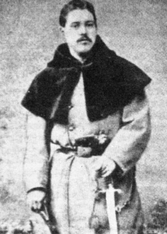 Celso Ceretti